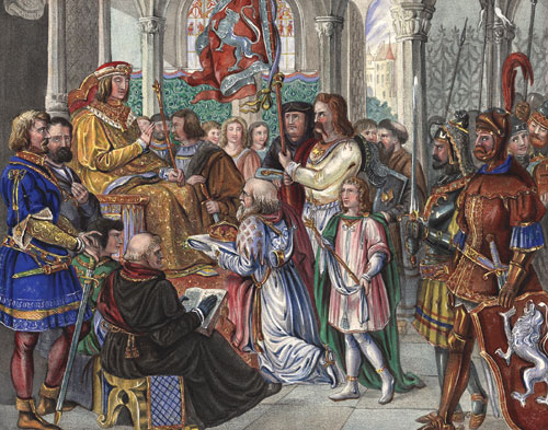 after Johann Georg Hiltensperger's fresco of c. 1825 (Wittelsbacher Zyklus, Hofgartenarkaden München)